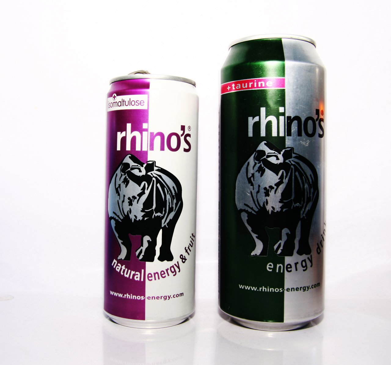 Die klassiche rhino's Dose und rhino’s natural Dose